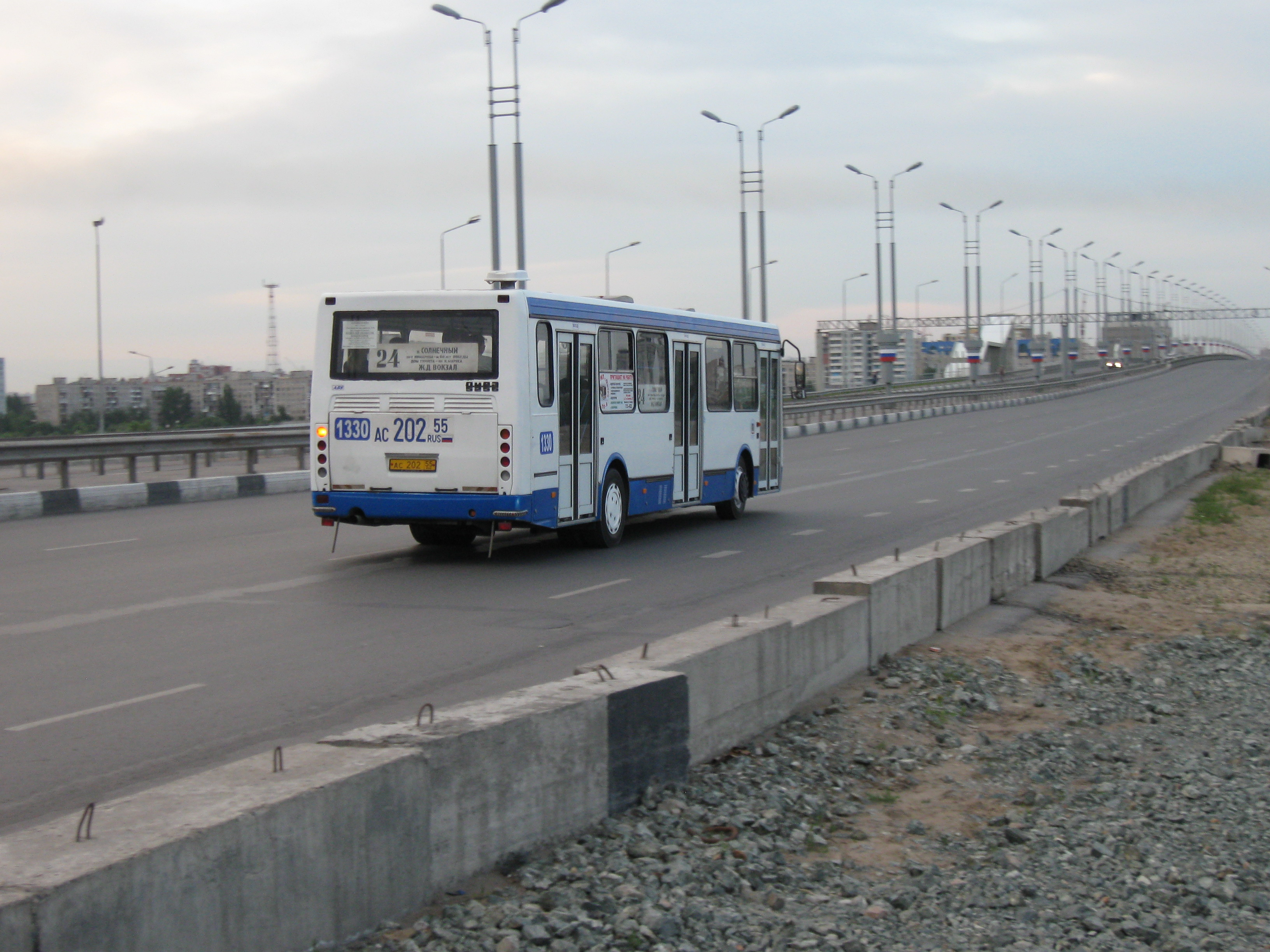 ЛиАЗ 5256 маршрута 24 на мосту им. 60-летия Победы в Омске.